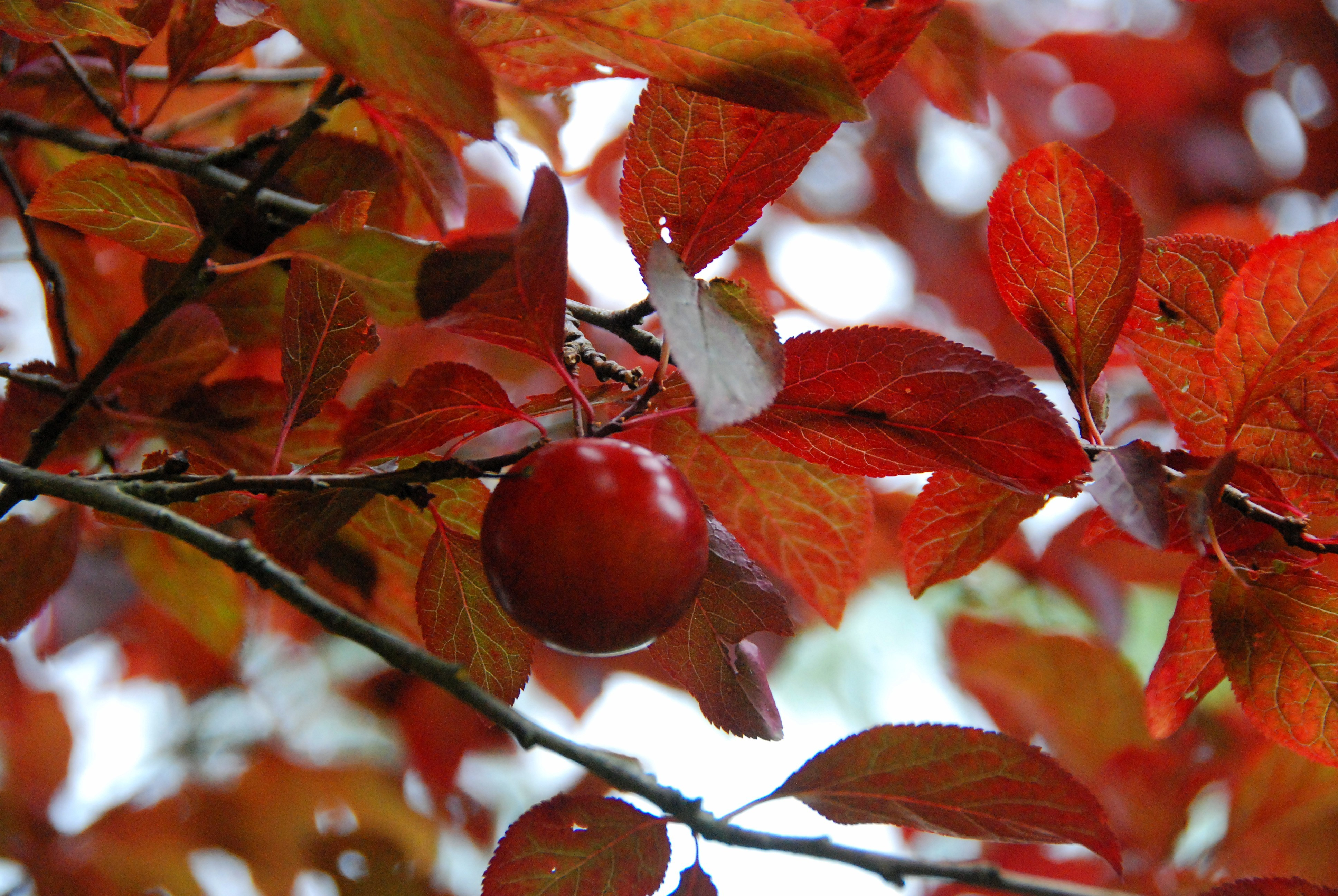 Uliako Lore-Baratzak parkea